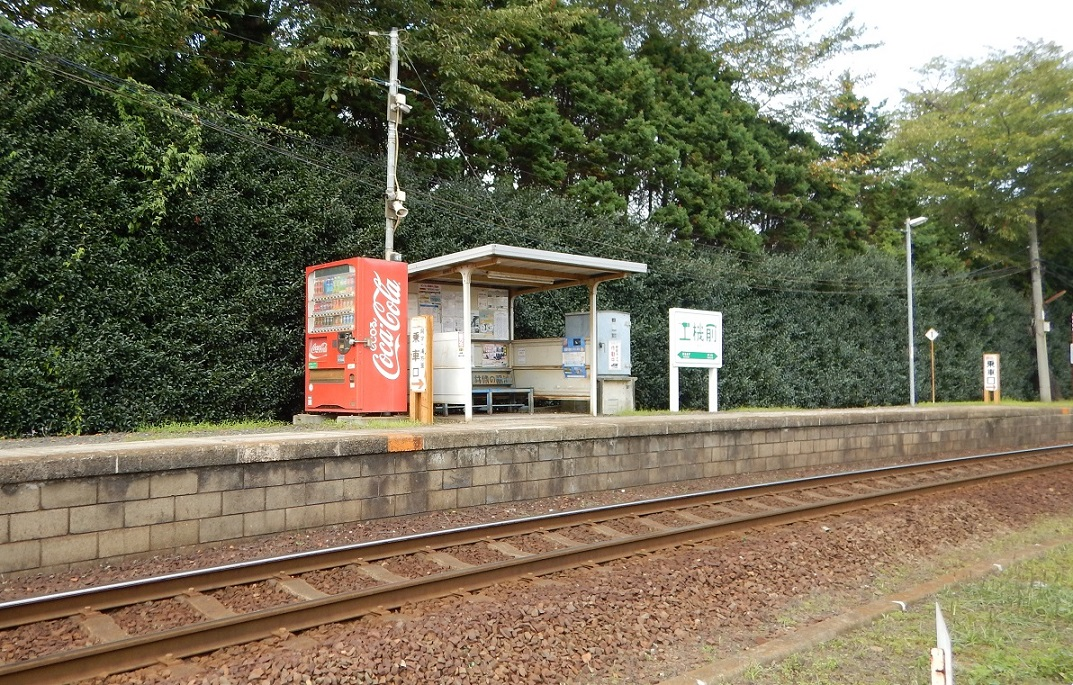 工機前駅ホーム